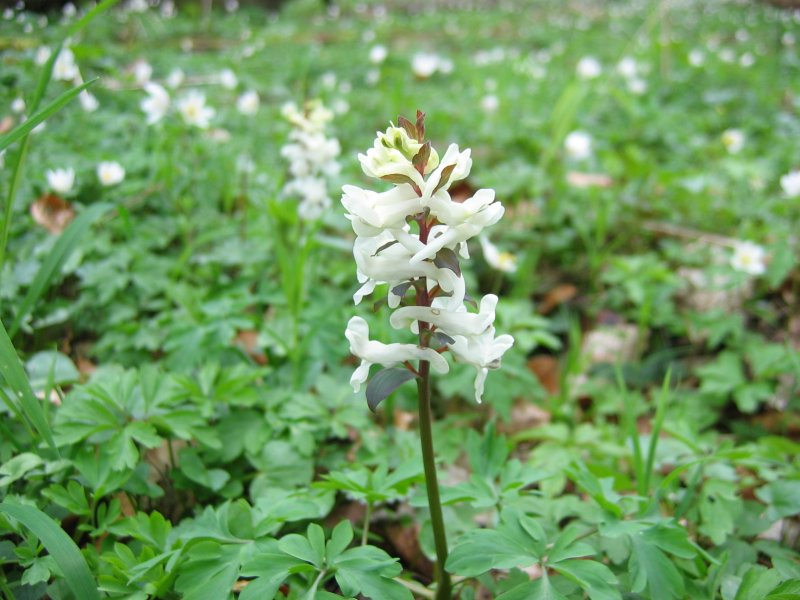 weiße Blüte des Hohlen Lerchensporns Corydalis cava, Pölchow bei Rostock